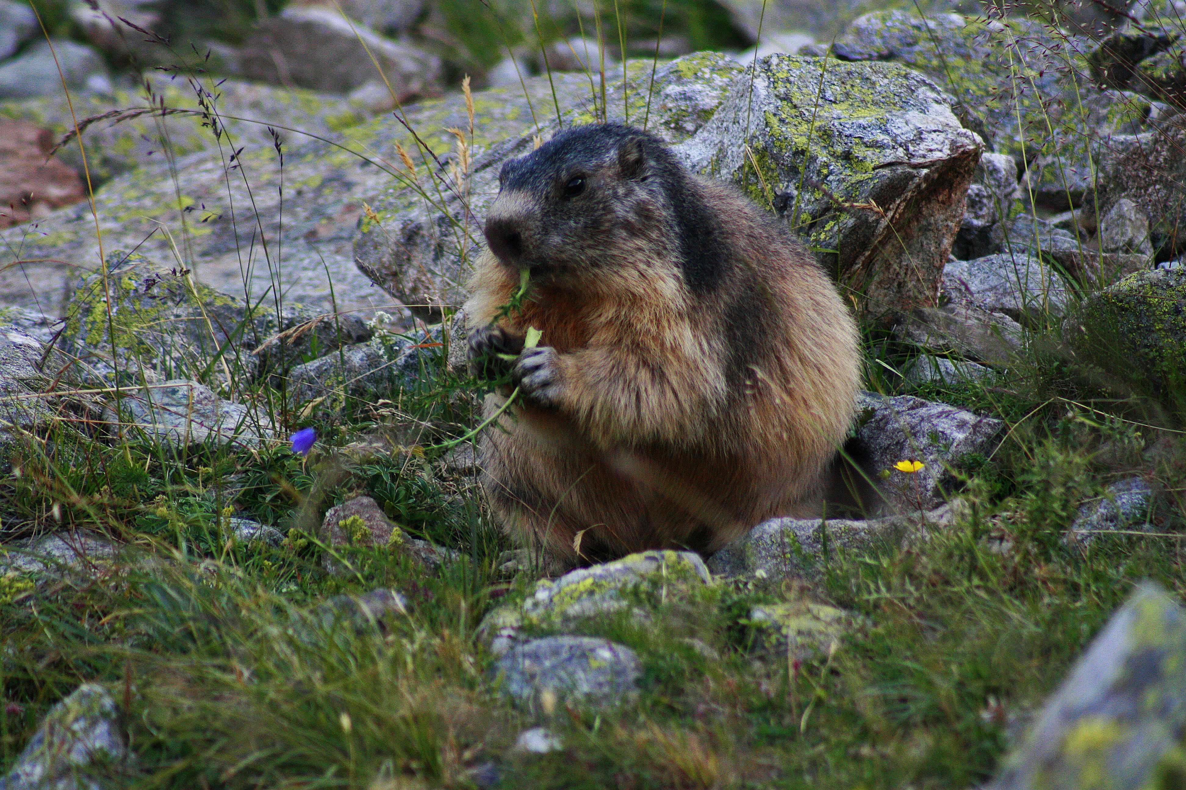 Un moment de partage